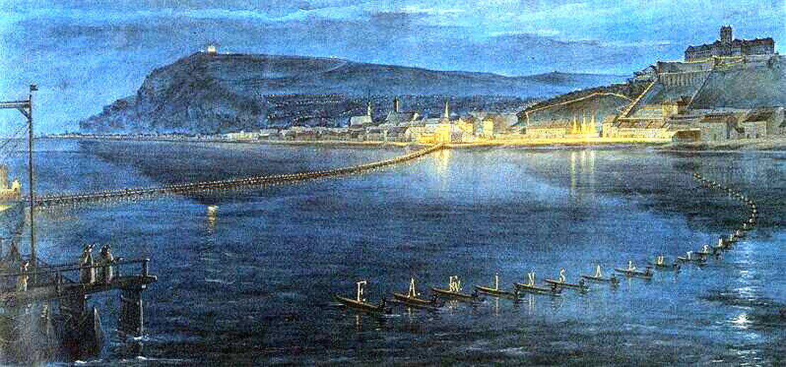 Egykorú akvarell az Országos Képtár metszet-gyűjteményében. – A három első sajkán látható betük a három fejedelem: Ferenc király, Sándor cár és III. Frigyes Vilmos porosz király neveinek kezdőbetűi. A többi betűk : IN SALUTEM POPULORUM; azaz: A népek üdvére.